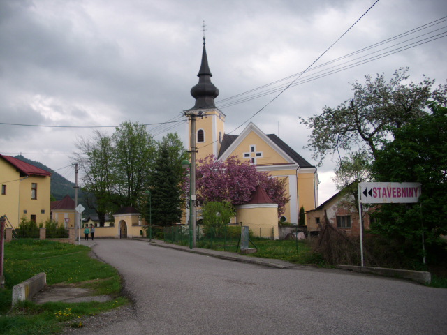 Die Kirche des Heiligen Martin in der sich die mumifizierte Heilige Sofia Bosniak befindet